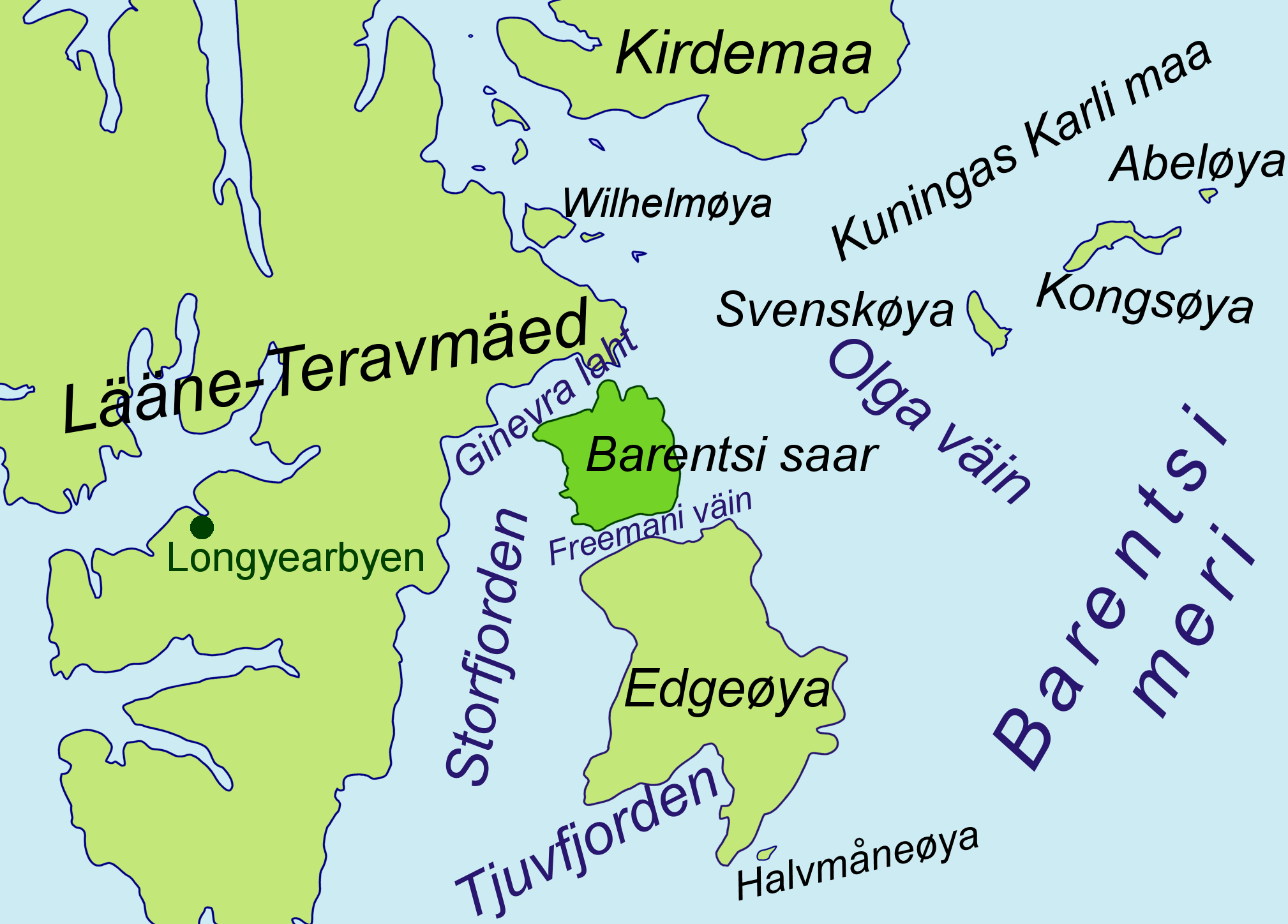 Barentsi saare kaart